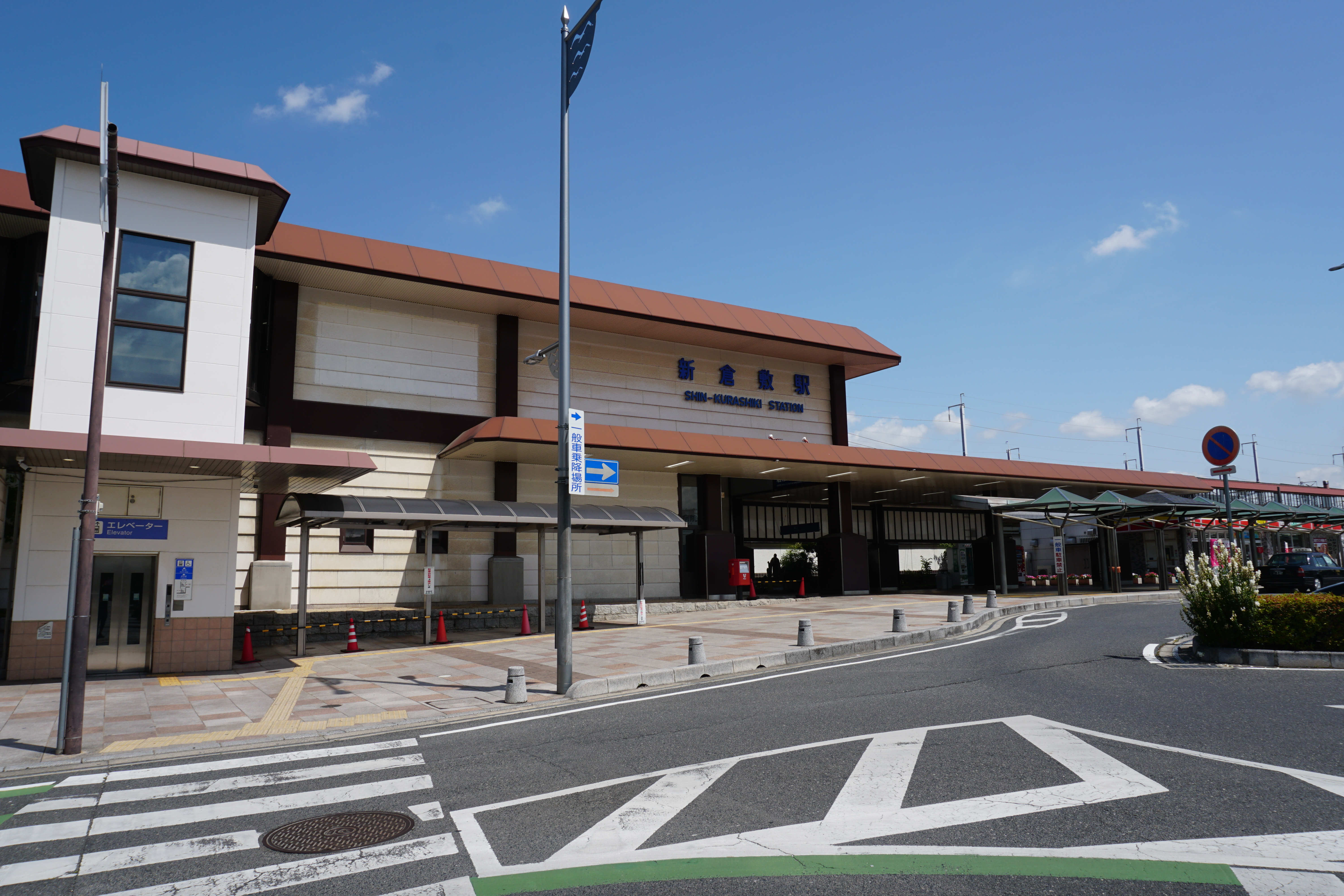 JR新倉敷駅南口を撮影。